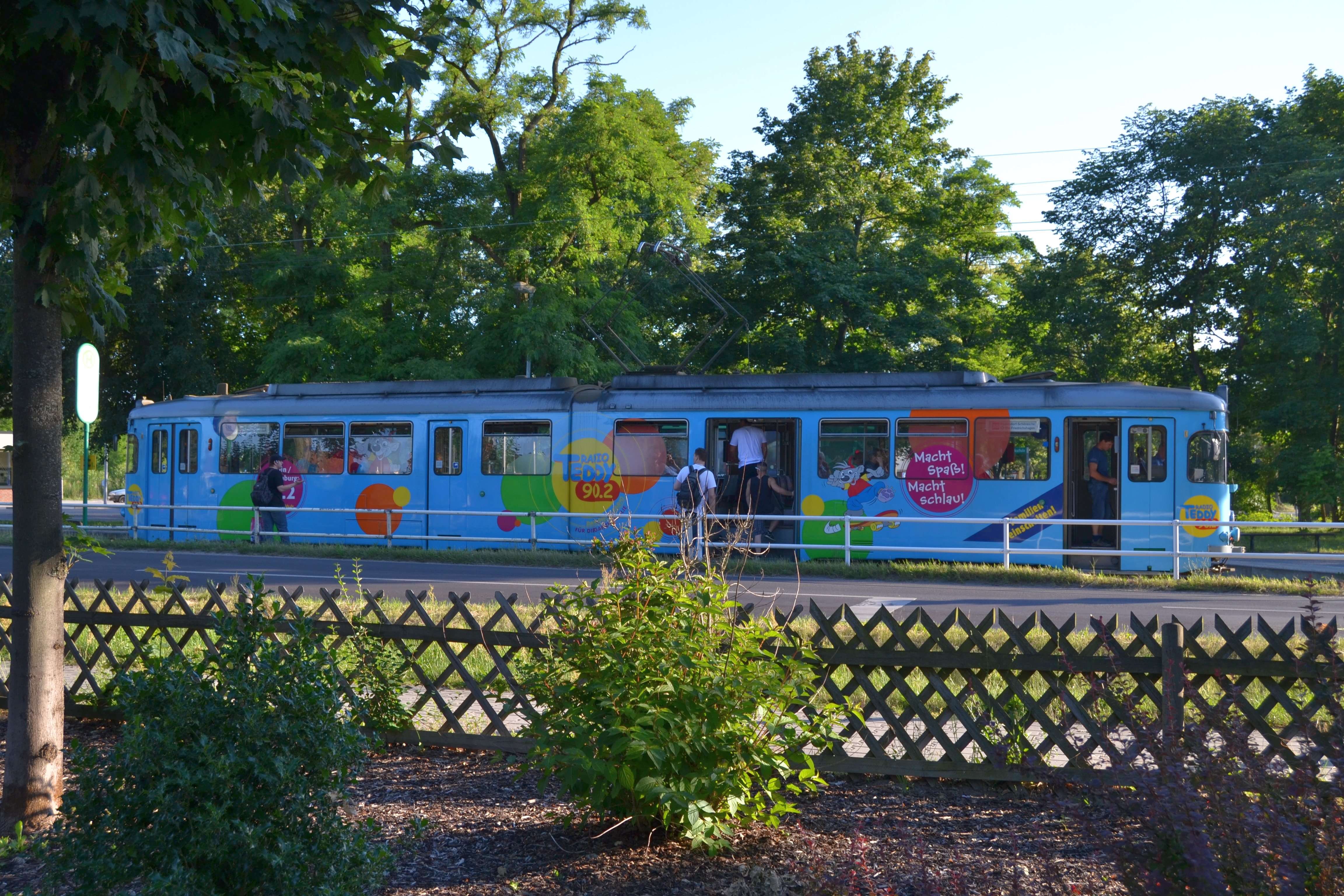 Triebwagen der Schöneiche-Rüdersdorfer Straßenbahn an der Haltestelle Grätzwalde in Schöneiche bei Berlin mit Radio-Teddy-Werbung.